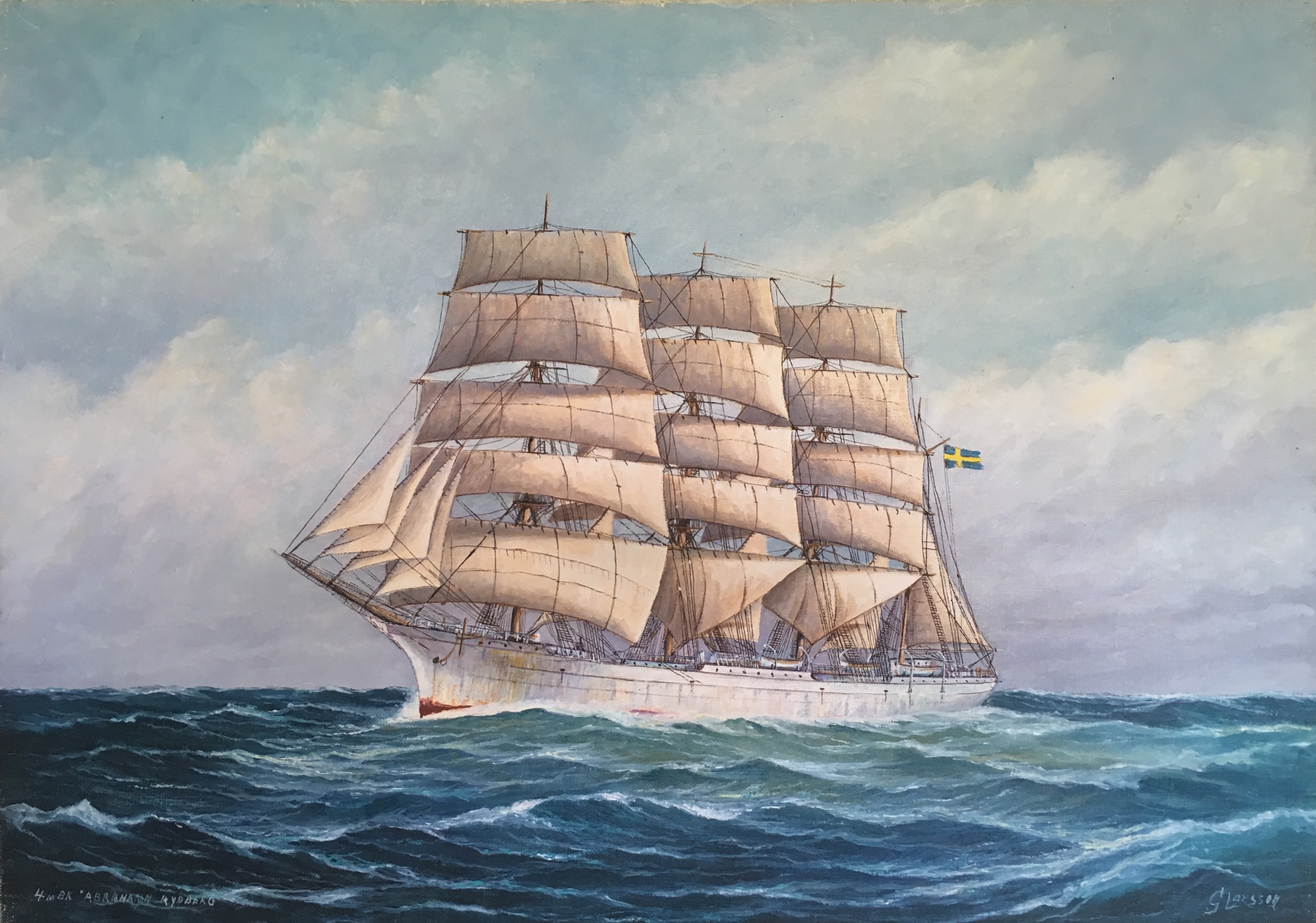 S/V Abraham Rydberg var ett stålfartyg, byggt 1892 i Glasgow. Det användes som skolfartyg av Abraham Rydbergs stiftelse från 1929. Fartyget såldes 1942 till ett rederi i Portugal. Det höggs upp i februari 1957. Fartygets längd var 79,5 meter, bredd 13,2 meter, djup 7,2 meter, dräktighet i registerton 2 345 och med en lastförmåga på 3 300 ton. Fartyget var uppkallat efter Abraham Rydberg (1780−1845). Oljemålning av Gunnar Larsson, född 29 september 1907 i Varberg; död 1982.